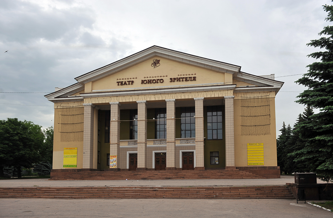 Макеевка. Донецкий областной русский театр юного зрителя